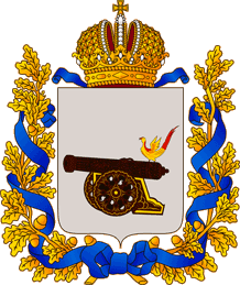 Герб Смоленской губернии. В серебряном поле черная пушка, лафет и колеса в золотой оправе, на запале райская птица. Щит увенчан Императорскою короною и окружен золотыми дубовыми листьями, соединенными Андреевскою лентою.